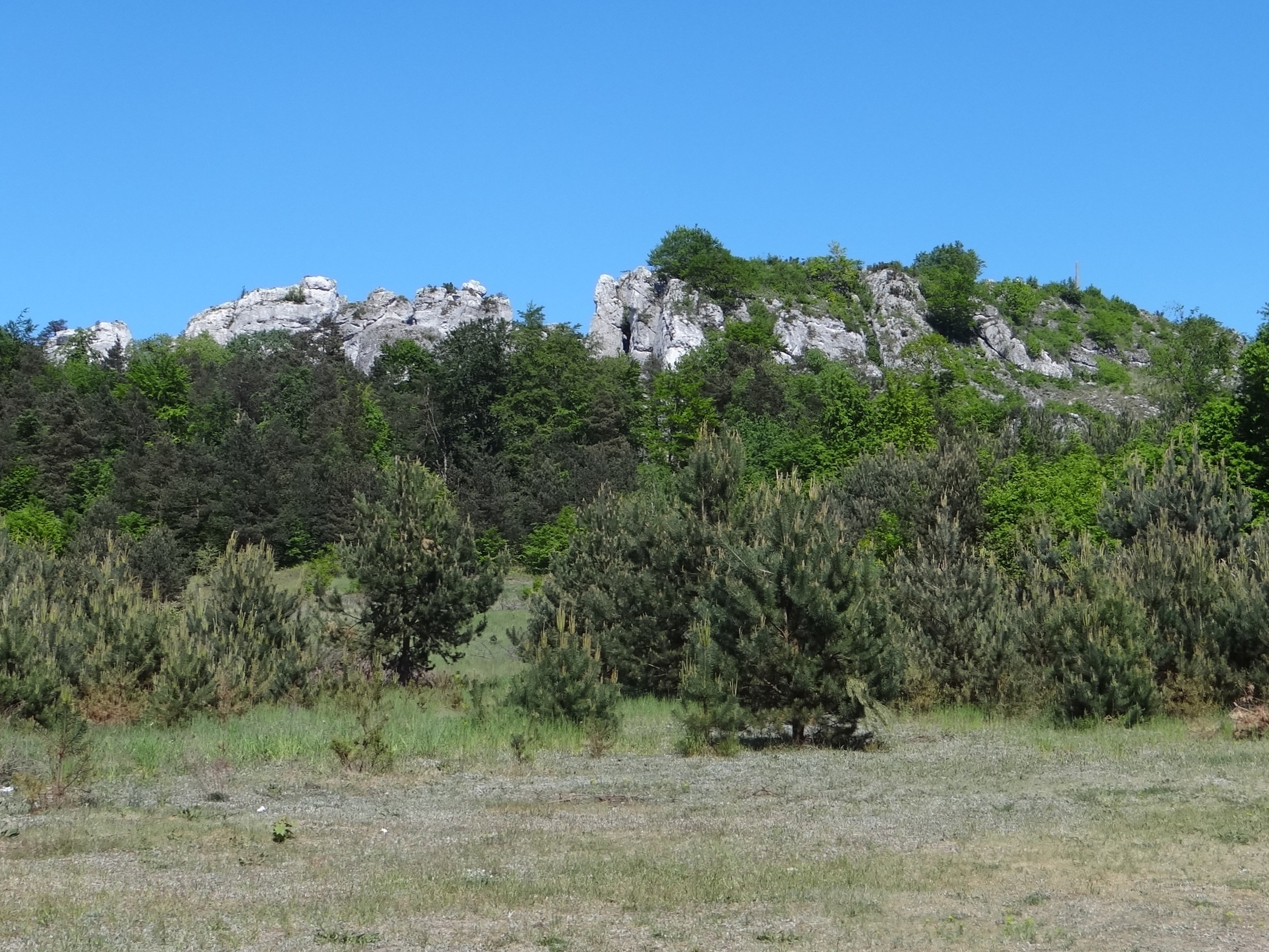 Formy skałkowe na Górze Zborów